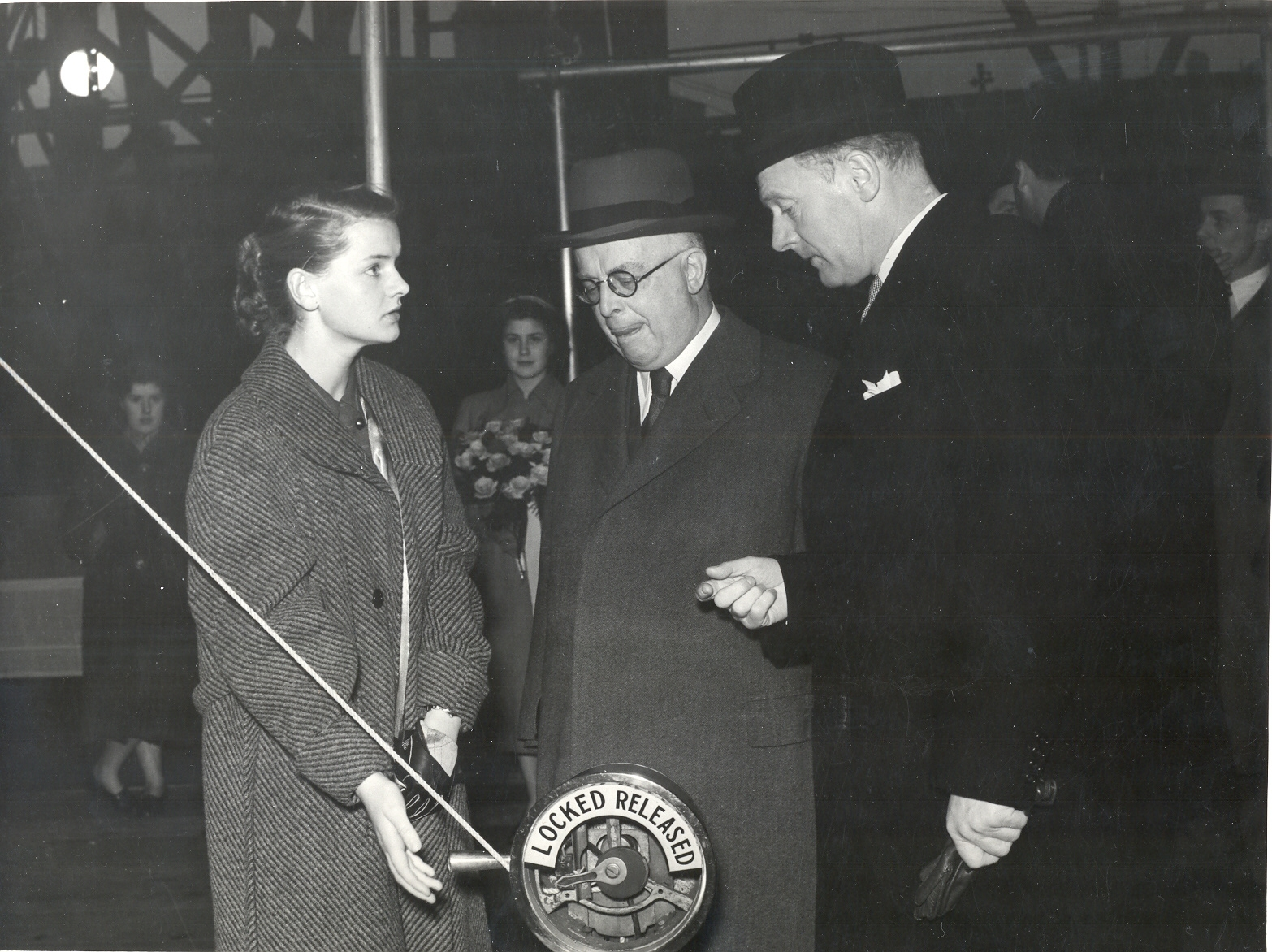 Sjøsettingen av M/T Octavian, 1953